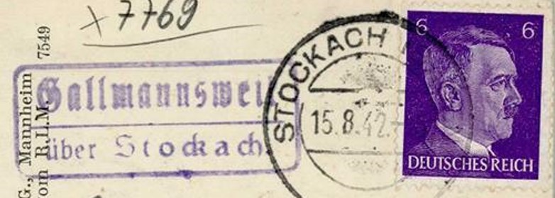 Deutschland (D) - Baden-Württemberg (BW) - Landkreis Konstanz (KN) - Mühlingen - Gallmannsweil: Poststempel 1942-08-15